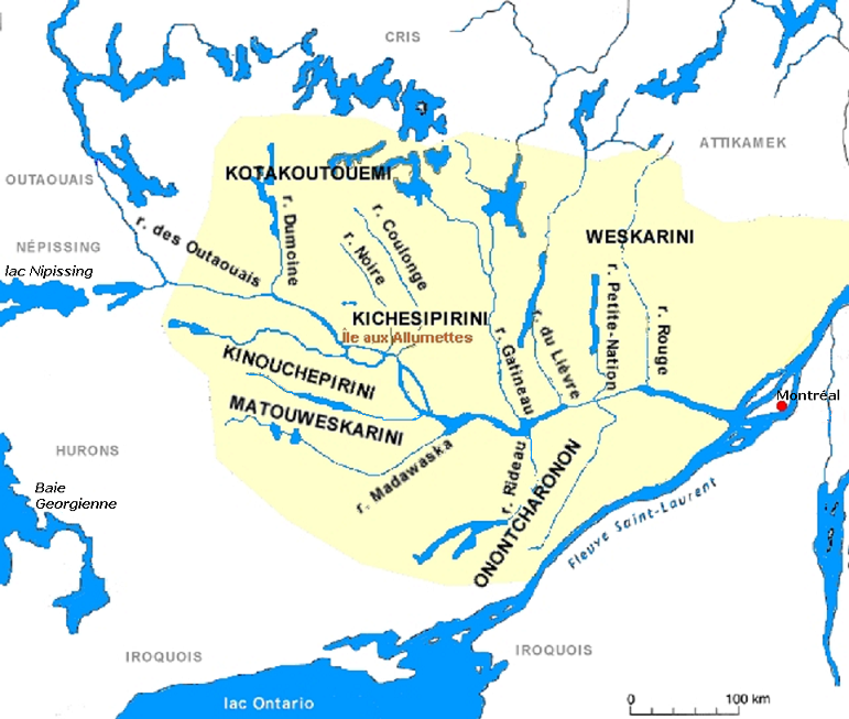 Algonquins de la vallée de l'Outaouais, première moitié du XXVIIe siècle